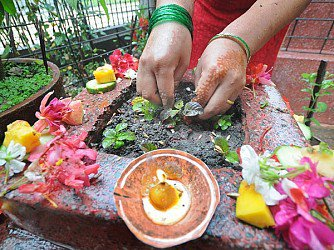 नेपाली: तुलसी पुजा